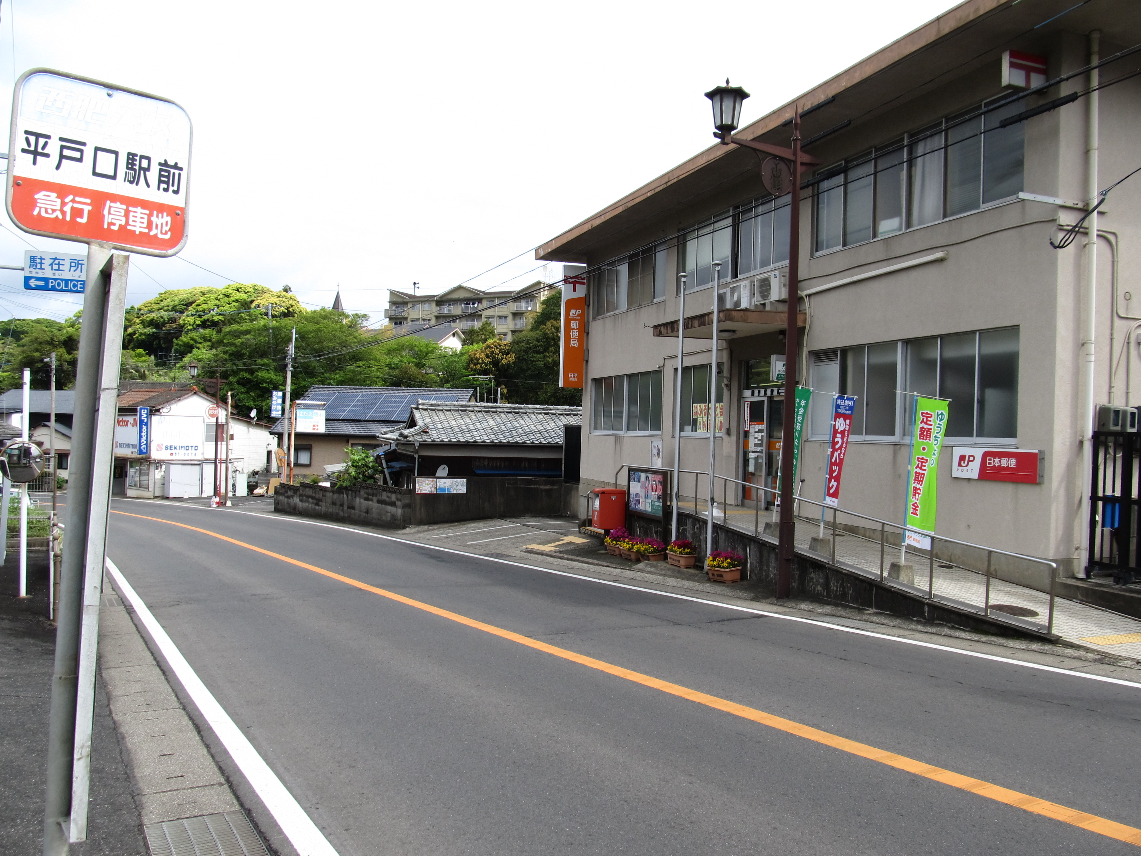 長崎県平戸市田平町の国道204号上にある西肥自動車（西肥バス）平戸口駅前停留所（平戸島・佐世保方面）。 松浦鉄道西九州線たびら平戸口駅から徒歩2分の位置にある。 道の向かい側には田平郵便局がある。 なお、松浦方面の停留所はたびら平戸口駅へのアプローチ道路の真前にある。